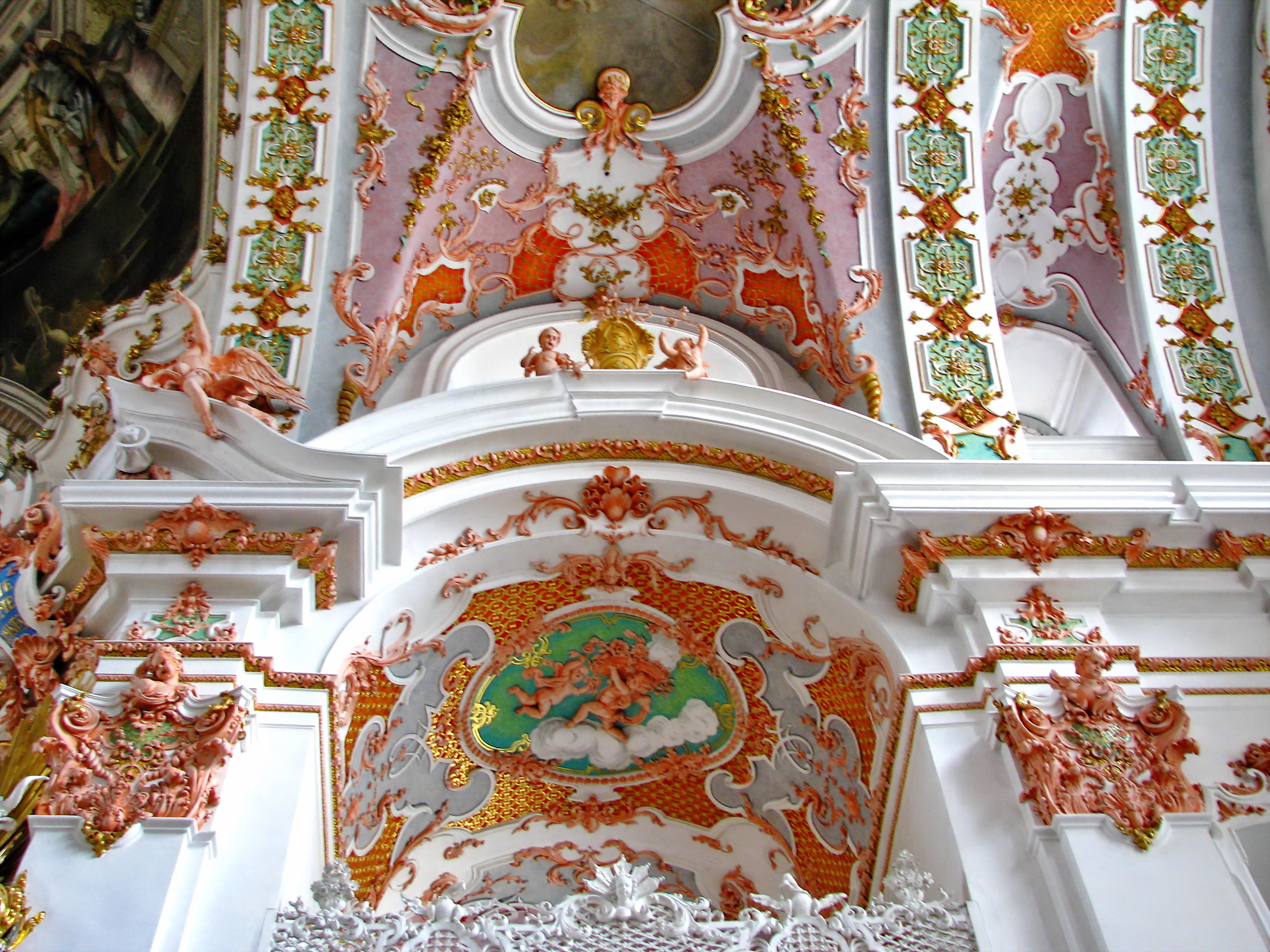 Klosterkirche in Einsiedeln (Switzerland)